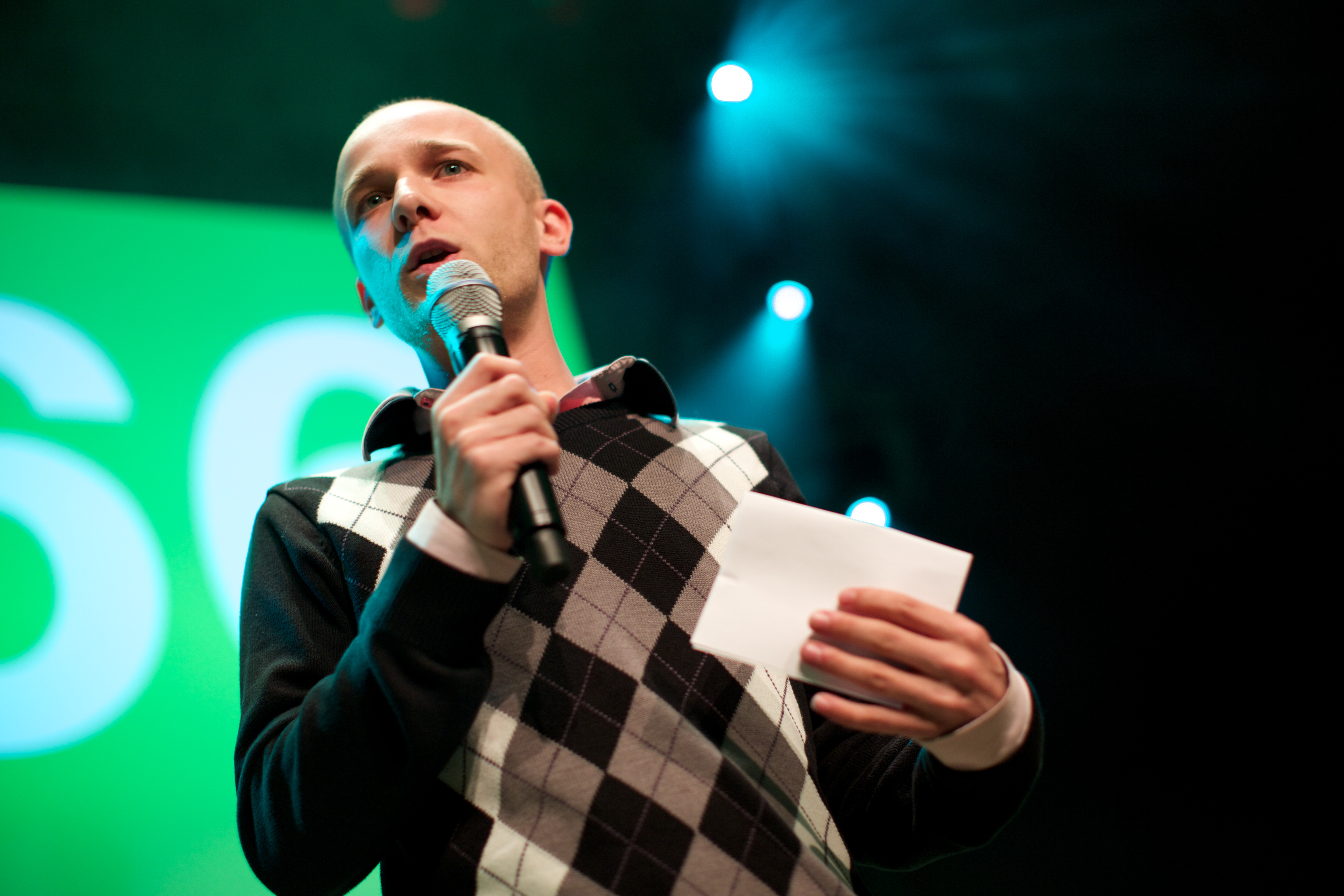 Diederik Smit van De Speld bij de D66 uitslagenavond Europese verkiezingen 2014 in Nijmegen.